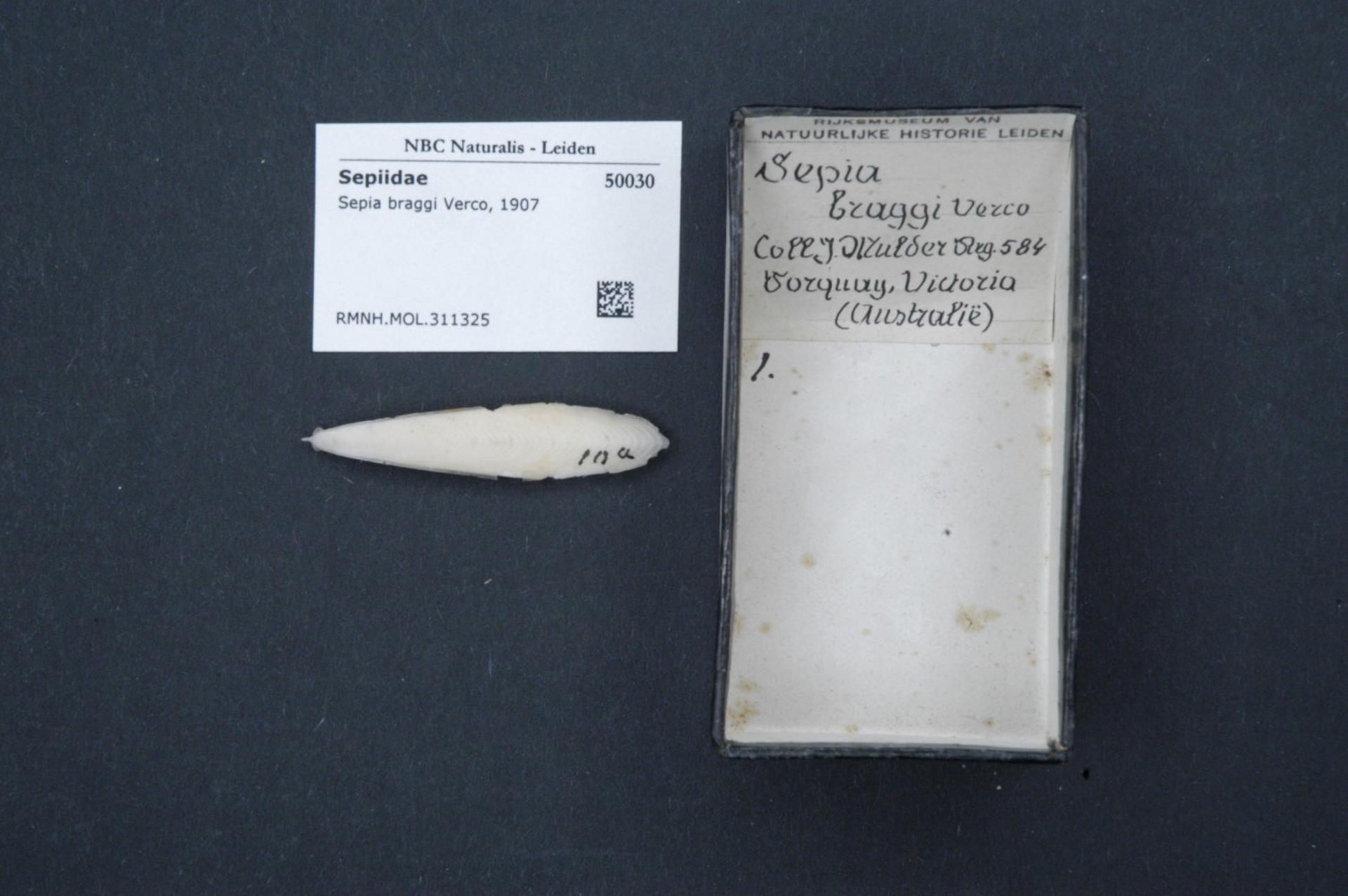 Sepia braggi Verco, 1907